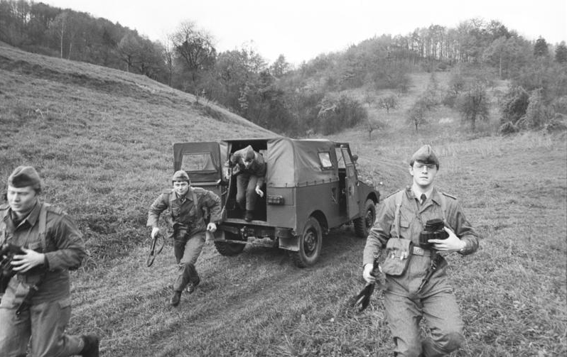 Kreis Mühlhausen, Einsatzübung von Grenztruppen ADN-ZB/Ludwig/27.3.82 Bez. Erfurt: Bei den Grenztruppen der NVA Einsatzübungen der Einheit Hähnlein im Kreis Mühlhausen. Die Einheit gehört in der Ausbildung und bei der Ausübung des verantwortungsvollen Dienstes zur Sicherung der Staatsgrenze der DDR zu den besten des Truppenteils "Eugen Levine". Gute Ergebnisse gibt es auch bei der Zusammenarbeit mit der Bevölkerung des Gebietes, in dem die Grenzsoldaten ihren Dienst tun.